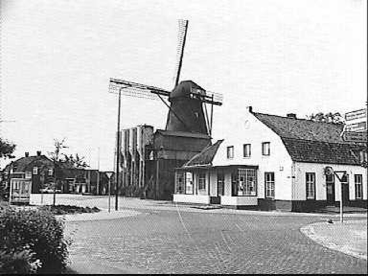 De Pelikaan: Molen De Pelikaan van achteren gefotografeerd (opmerking: Deze afbeelding hebben wij helaas alleen in deze lage resolutie.)